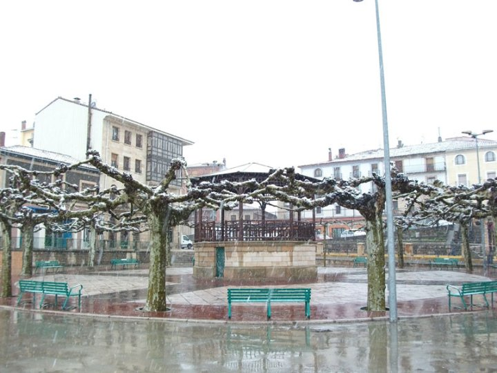 Vista nevada de la plaza mayor de Quintanar de la Sierra (Burgos)